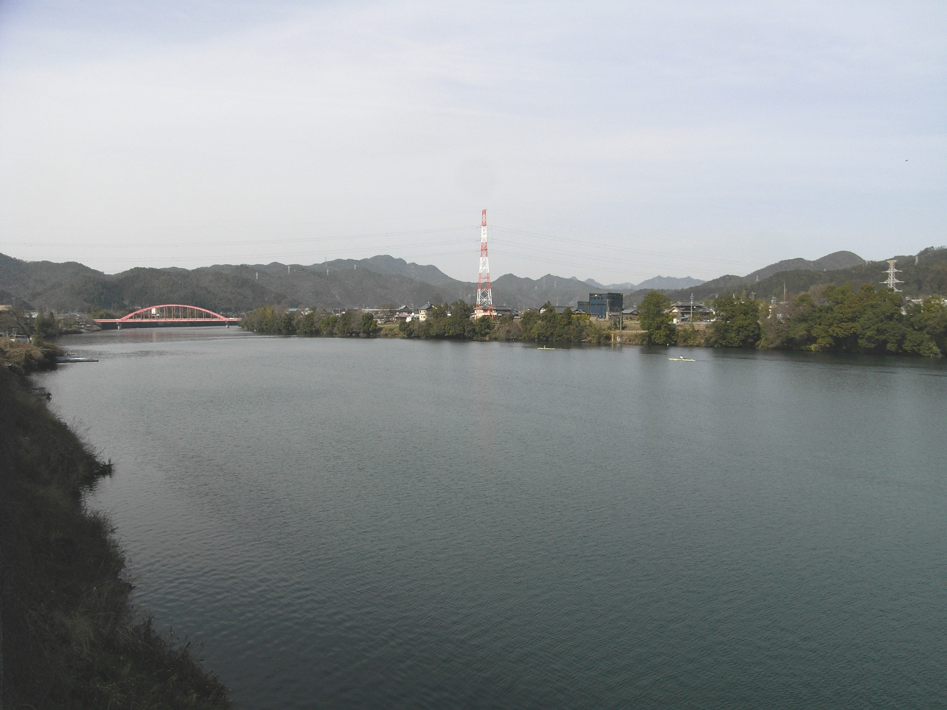 Lake